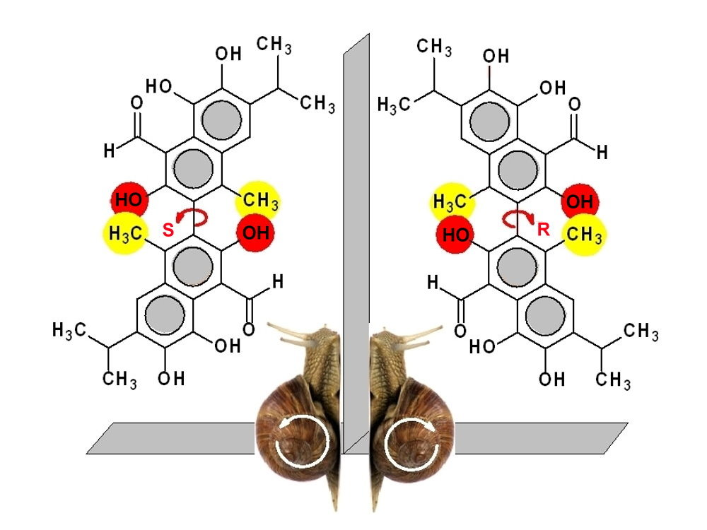 14_Gossypol-Grafik_1000x750